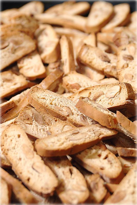 ... e non chiamateli cantuccini !!